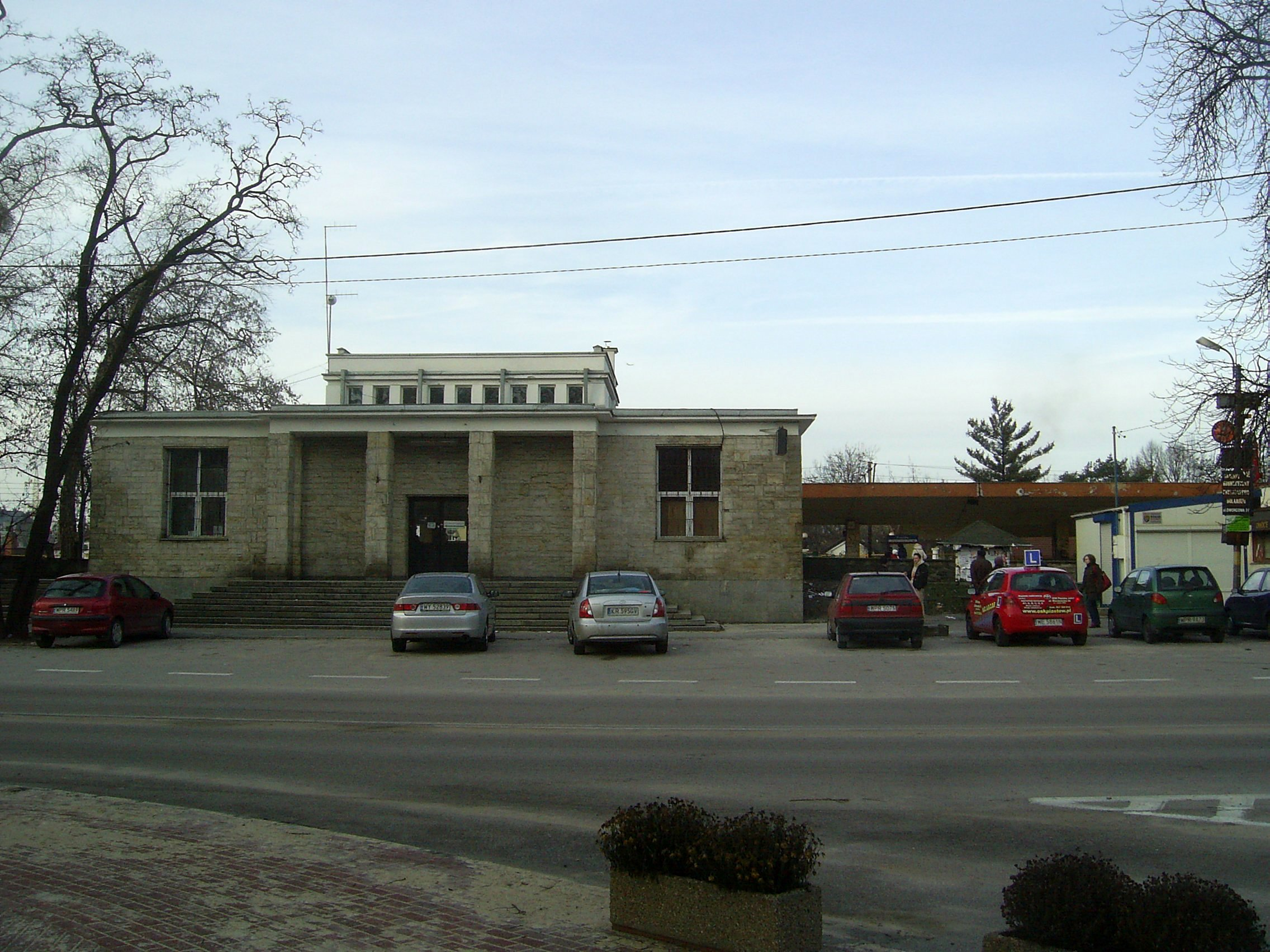 Przystanek kolejowy w Piastowie od południa